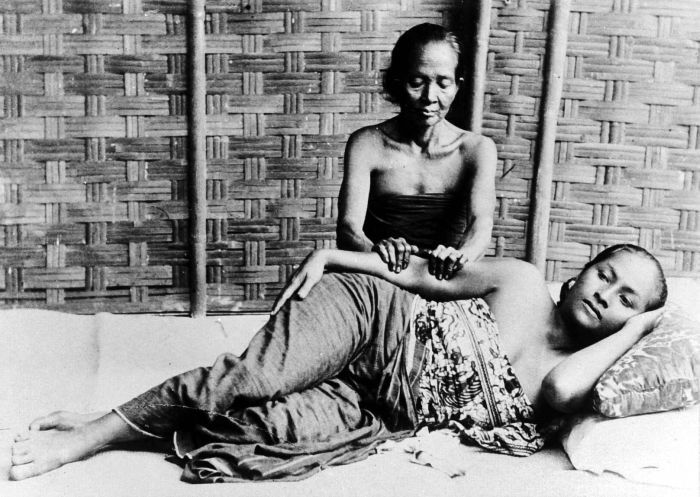 Repronegatief. Tot het complex van de traditionele geneeswijze behoort ook de tukang of dukun pijit, oftewel de masseuse. Deze doorgaans vrouwelijke expertise wordt vaak van moeder op dochter overgedragen. Ook Europeanen waren vaak enthousiaste klanten van deze masseuses. Tenminste zo bekend en belangrijk was de dukun bayi, de traditionele vroedvrouw. Volgens de meeste Westerse medici waren deze vroedvrouwen een gevaar voor de gezondheid van moeder en kind als er bij een bevalling complicaties optraden. Bij ongecompliceerde bevallingen, het merendeel van de gevallen, was er op de lokale vroedvrouw minder aan te merken. (P. Boomgaard, 2001). Een vrouw krijgt een 'pidjit', een inlandse massage